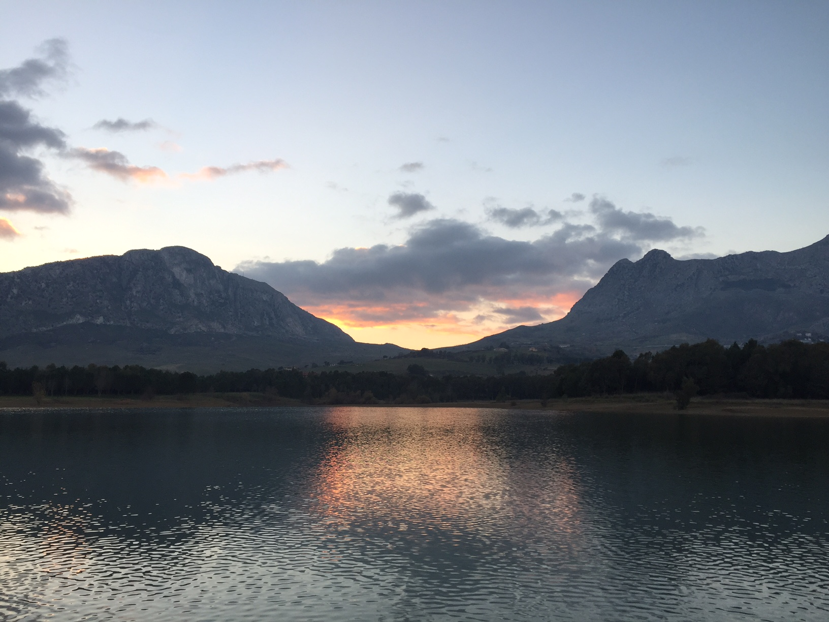 Lago di Piana degli Albanesi